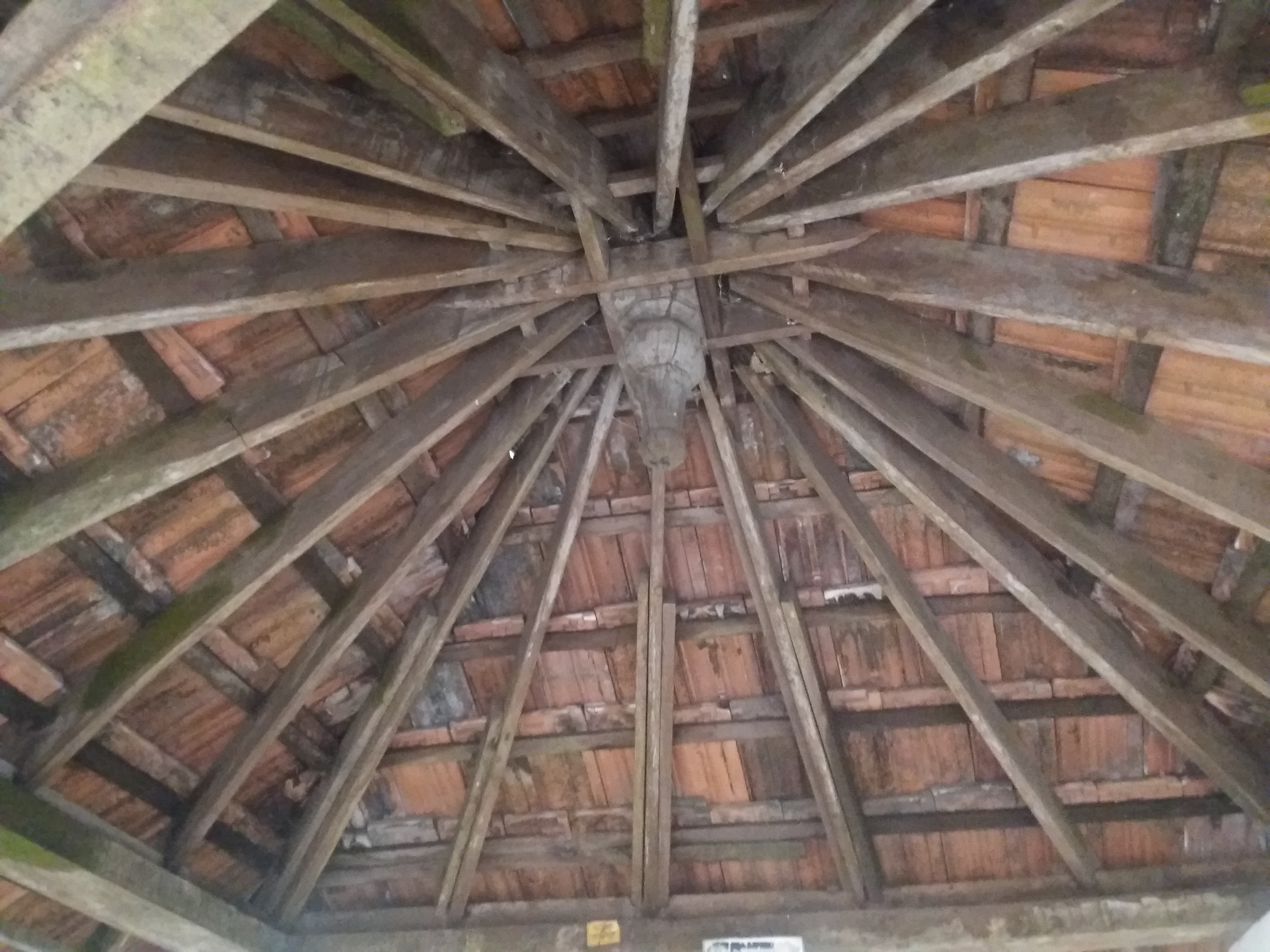 കേരളത്തിലെ കോട്ടയം ജില്ലയിൽ കഞ്ഞിരപ്പള്ളിക്ക് സമീപമുള്ള വിഴിക്കിത്തോട് ഗ്രാമത്തിൽ സ്ഥിതി ചെയ്യുന്ന വഴിയമ്പലത്തിന്റെ മേൽക്കൂര